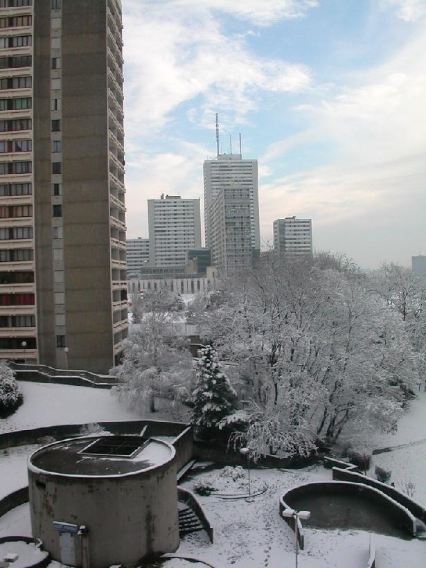 Bagnolet: Les tours de la Noue, sous la neige, fevrier 2004. Je suis l'auteur de cette photo.